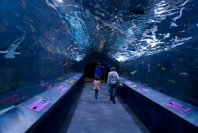 Underwater glass tunnel, Newport aquarium.